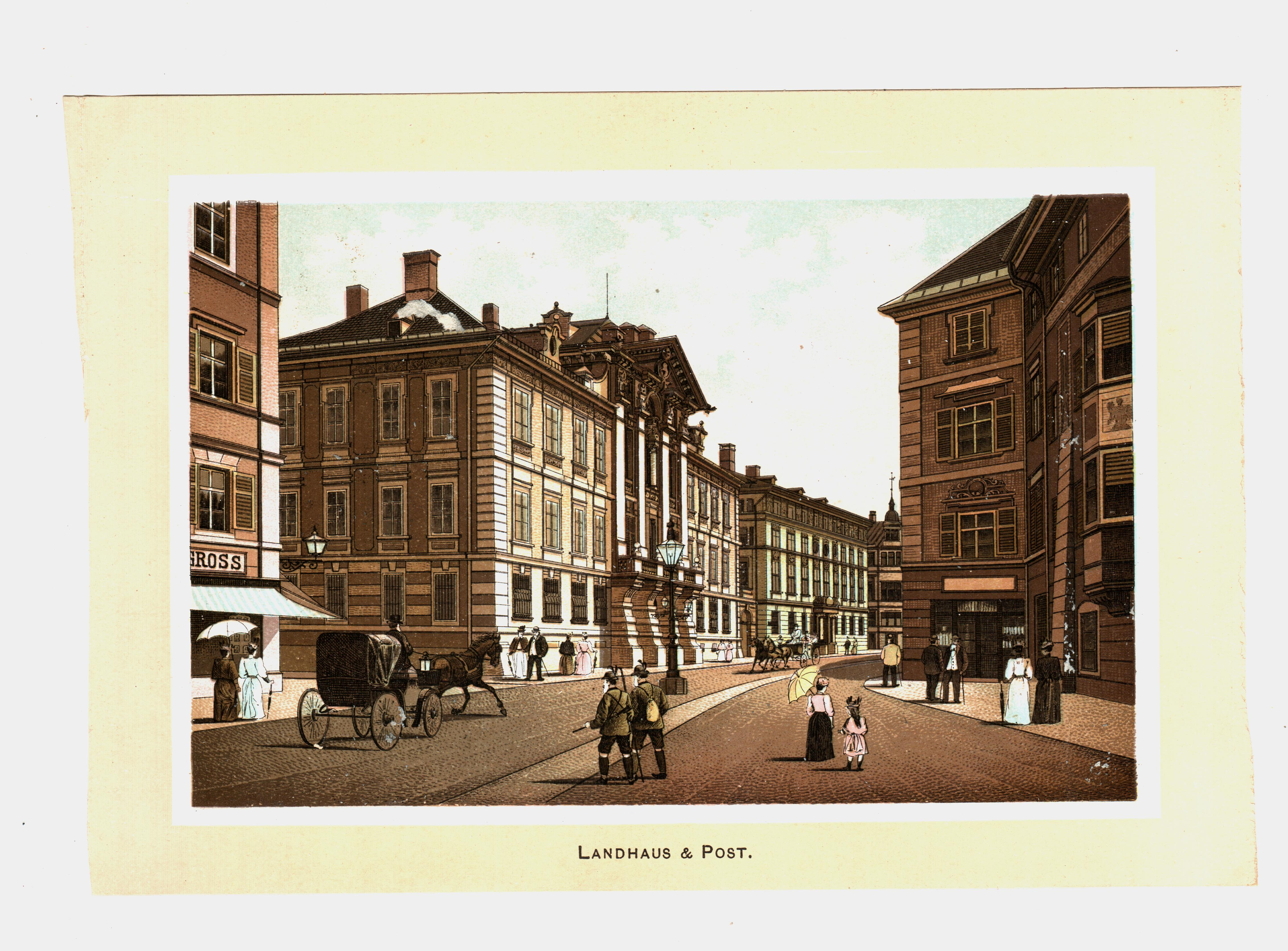 Osztrák-Magyar Monarchia, Innsbruck. Ismeretlen fényképész. Erinnerung an Innsbruck (Emlékezés Innsbruckra) című fényképalbum fényképeiből. A 17 fénykép leporellóként összehajtogatott fotópapír szalagra készült. A fényképek mérete: 14 cm x 9,1 cm. A fényképek hátoldalán ex-libris. ©© Megjelent Creative Commons alatt a Metapolisz sorozatban. A Metapolisz sorozat valamennyi képe és filmje Creative Commons alatti valamint kereskedelmi - for profit - célra is felhasználható. Ajánlott hivatkozás: Derzsi Elekes Andor: Metapolisz DVD line ©© Published under Creative Commons in the Metapolisz DVD line. All of the photos and vids in the Metapolisz DVD line are under Creative Commons and can be used even for commercial – for profit – purposes. Recommended Citation Derzsi Elekes Andor: Metapolisz DVD line